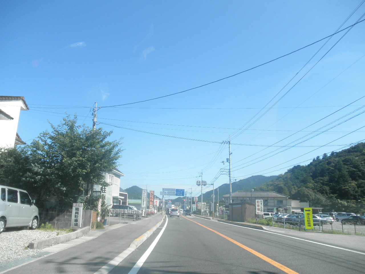 徳島県美波町奥河内本村 国道55号